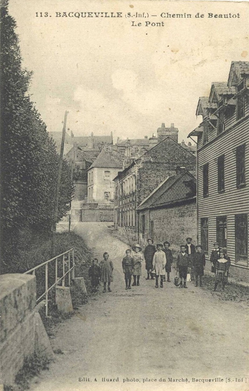 Carte postale du village vers 1910.